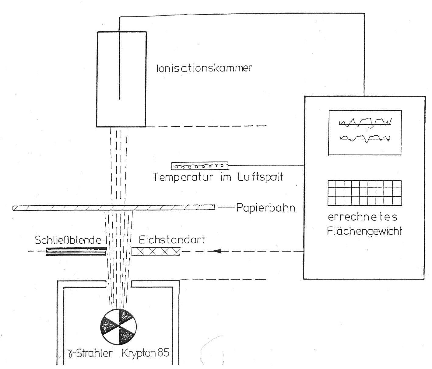 schematische Darstellung der Flächengewichtsmessung an einer Papiermaschine